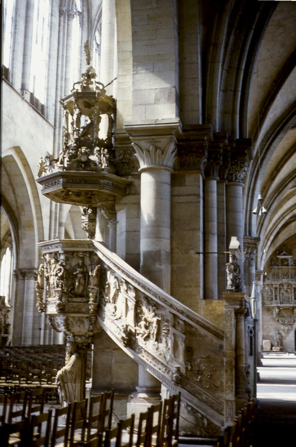 Magdeburger Dom - Kanzel